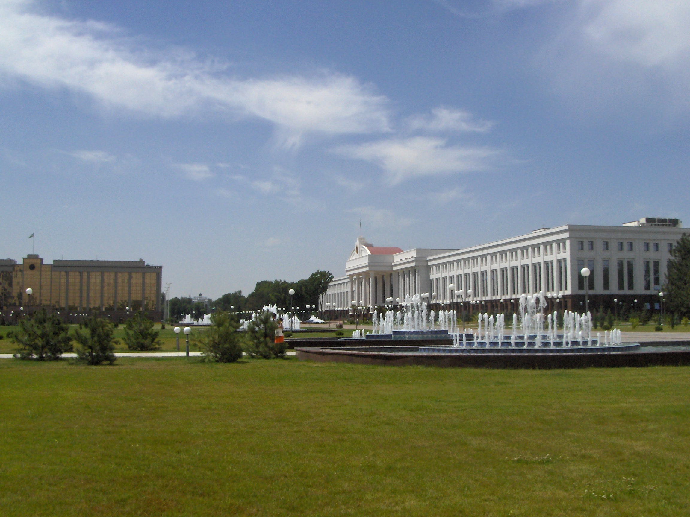 Uzbek Government, Tashkent